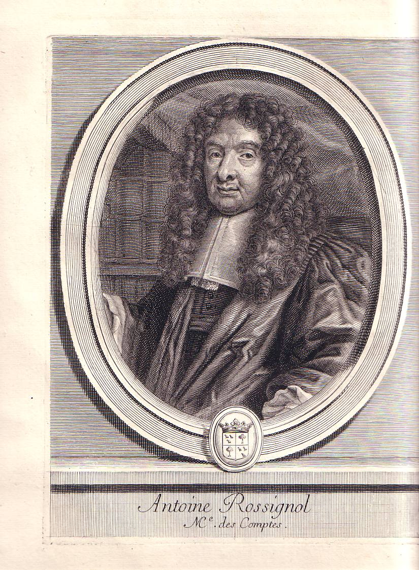 "Antoine Rossignol, maître des comptes."